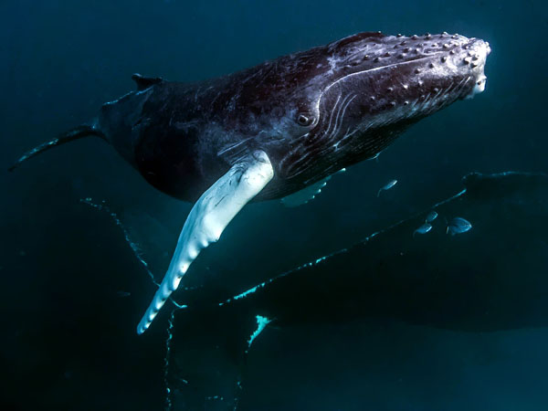 Humbak